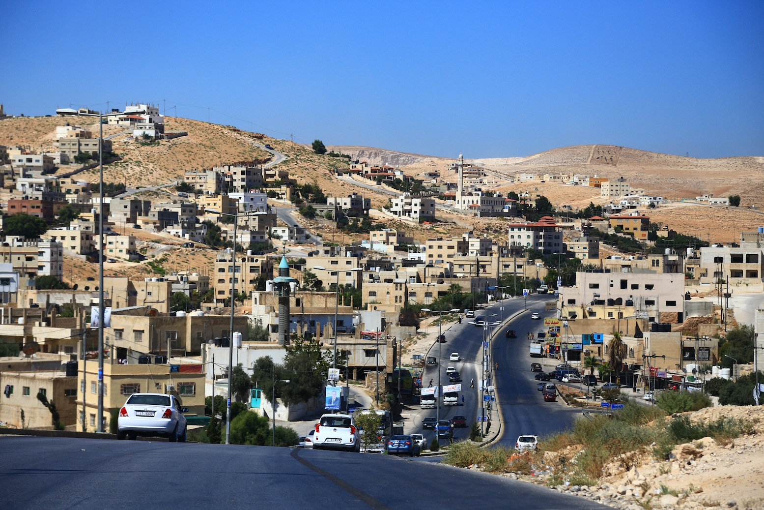 Qurtobah, Az-Zarqa, Jordan